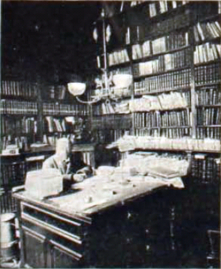 José Toribio Medina Zavala (Santiago; 21 de octubre de 1852 – 11 de diciembre de 1930) Bibliógrafo e Historiador chileno, el mayor recolector de fuentes para el estudio de la historia de su país.